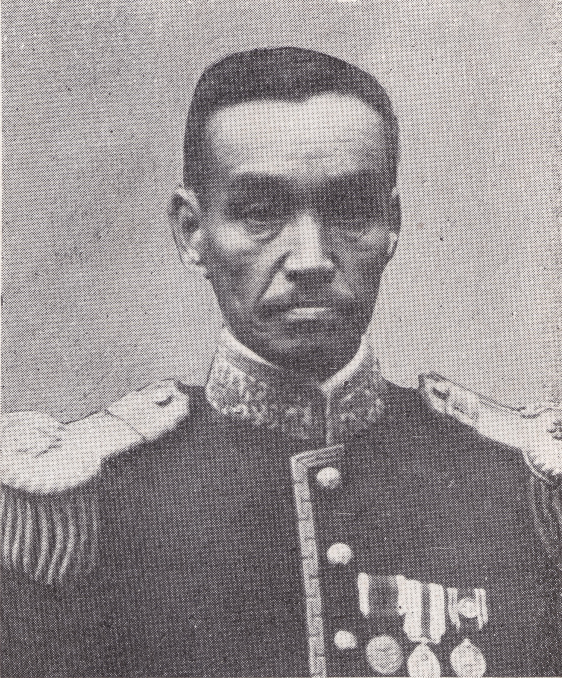 貴族院議員・子爵藤谷為寛